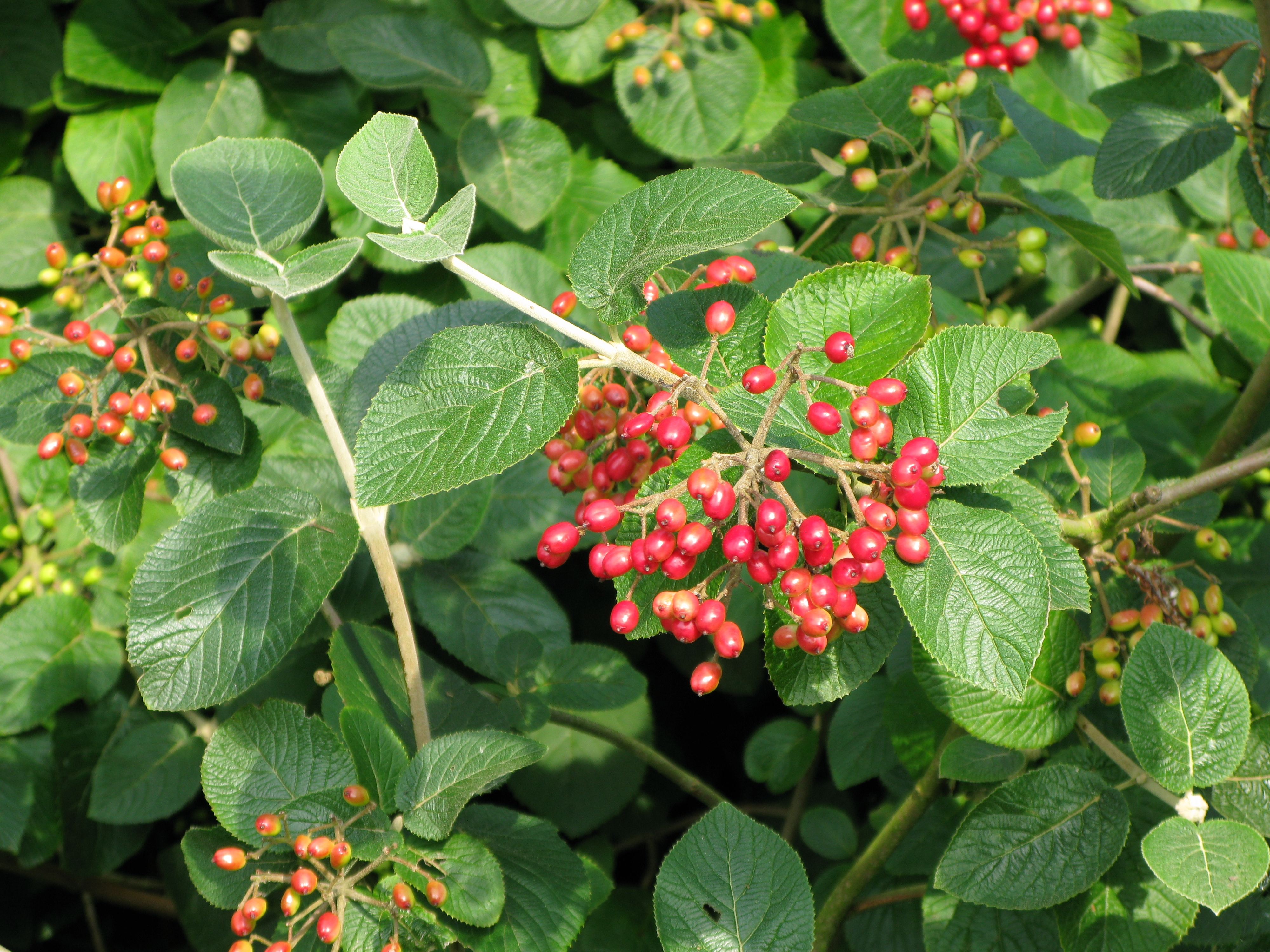 Wolliger Schneeball